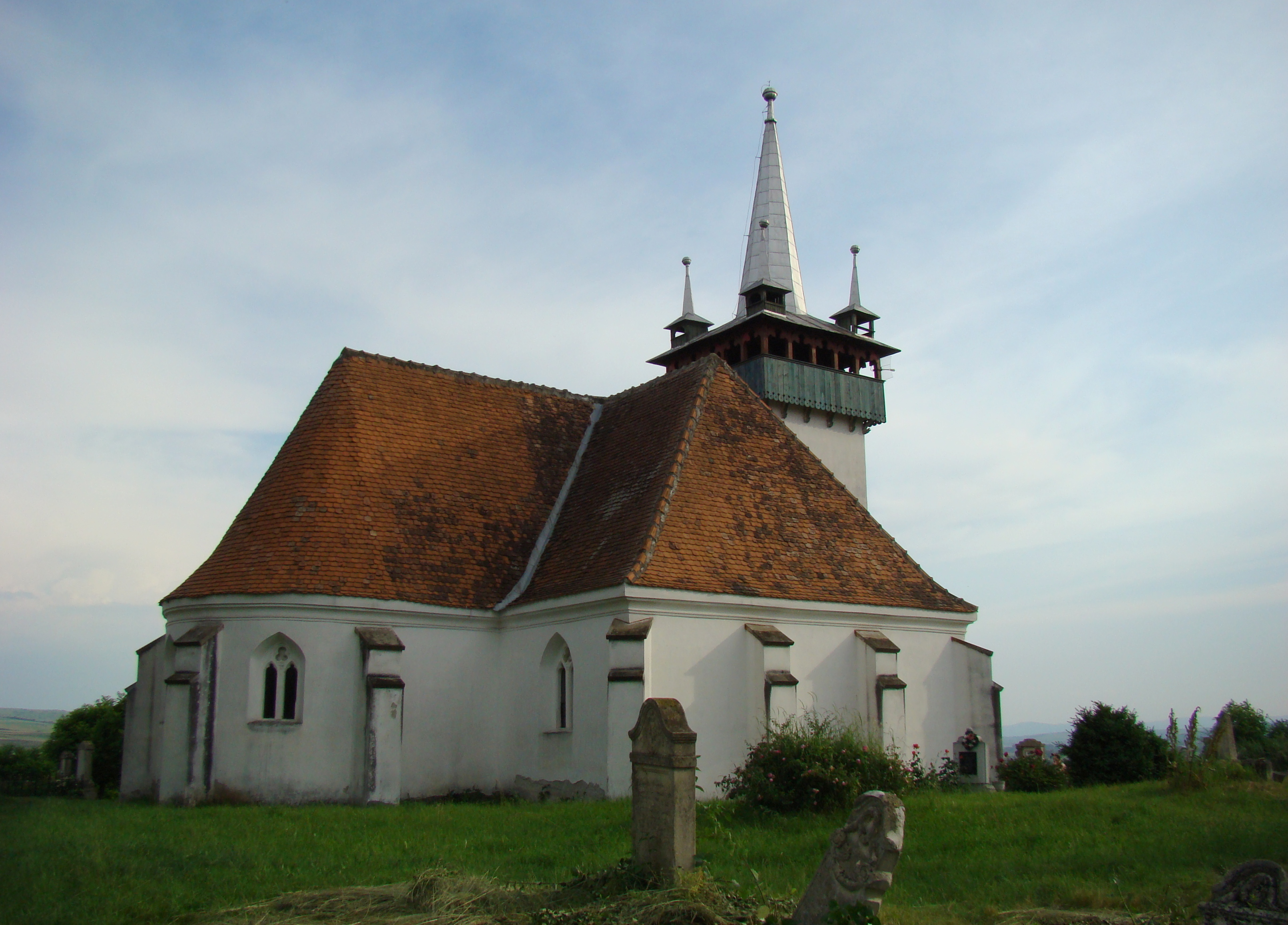 Biserica reformată, sat aparținător Ciumbrud; municipiul Aiud 01